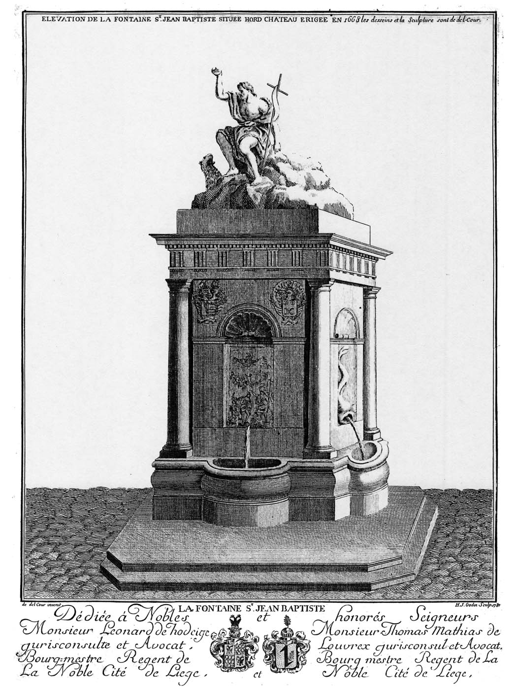 Représentation de la fontaine Saint-Jean-Baptiste en 1780 par Henri Godin